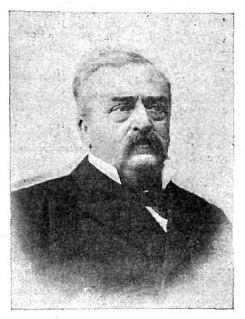 Retrato de Enrique Suender.